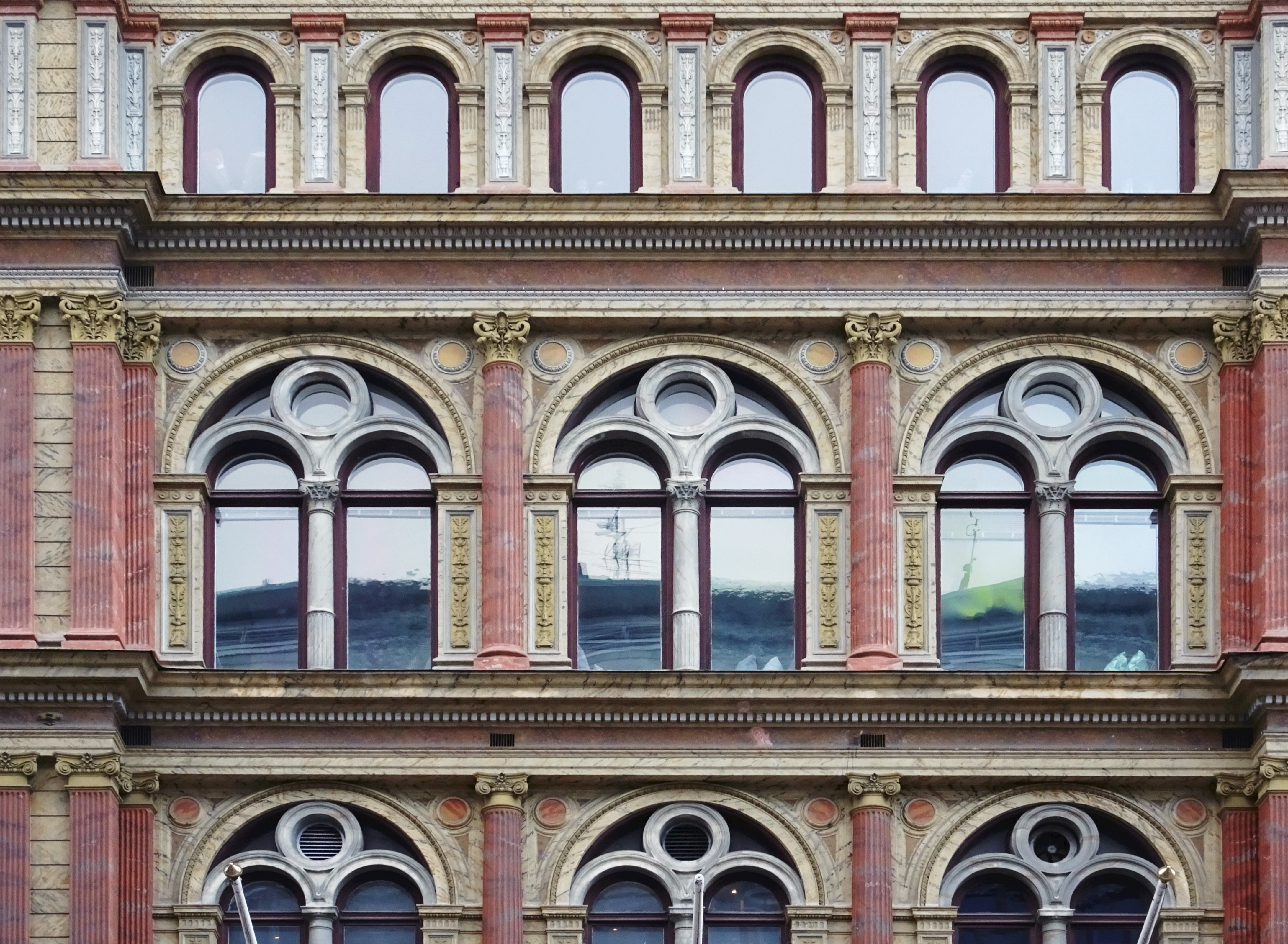 Sturegatan 4 (Sturebadet) fasad, detalj